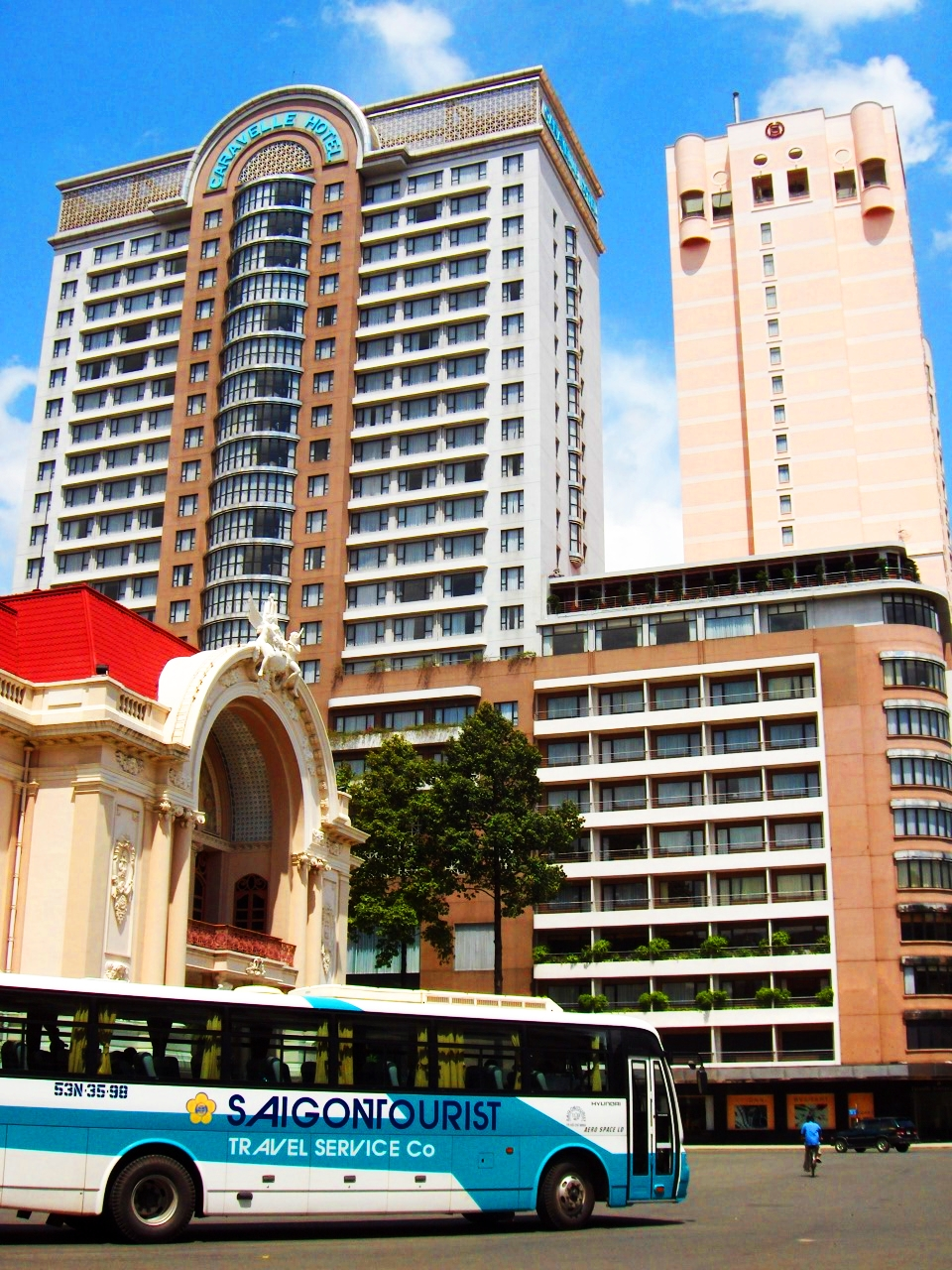 Immeuble à Saigon